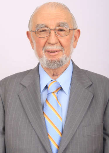 Senador Sergio Mariano Ruiz-Esquide Jara